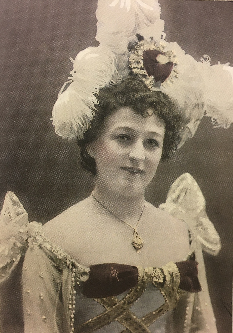 Anna i scenutstyrsel,1890-talet, affisch. IMG 9206